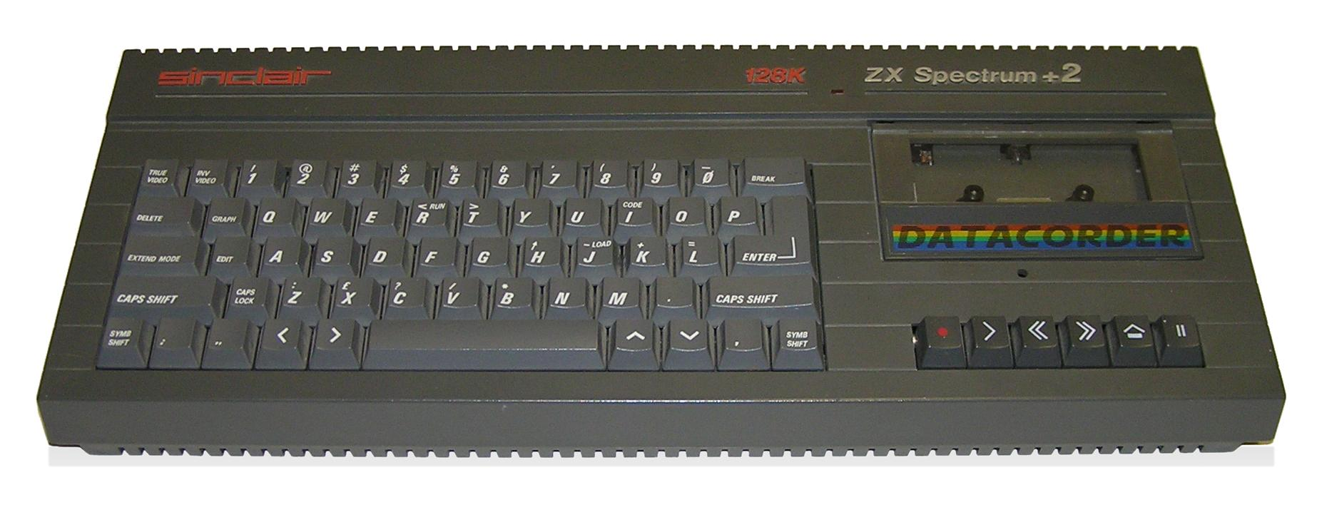 El ZX Spectrum +2. Éste fue el primer modelo nuevo de Spectrum lanzado por Amstrad tras la compra de la gama. ZX Spectrum +2. Photographed by User:StuartBrady. Public domain.